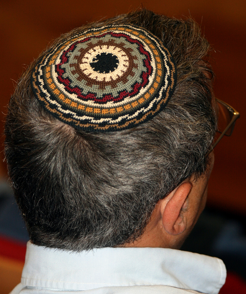 Kippah